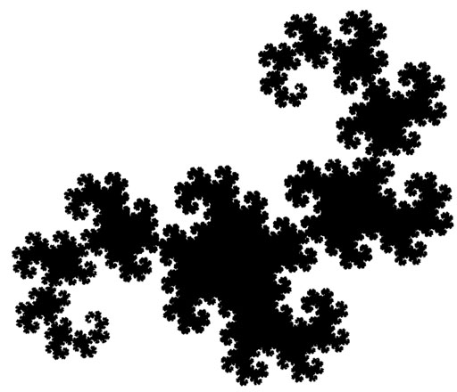 Harter-Heighways drakkurva, (en fraktal). Se även: Färgvariant av bilden. Andra bilder i samma serie: Linjära fraktaler: Sierpinskitriangel Lévys C-kurva von Kochs snöflinga Kategori:Bilder av fraktaler Dragon curve